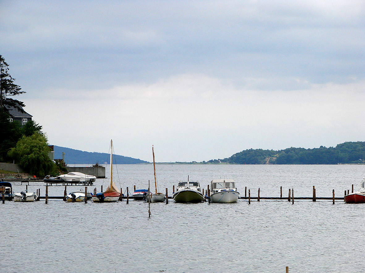 Vejle Fjord' set mod øst fra Bredballe på den nordlige side af fjorden